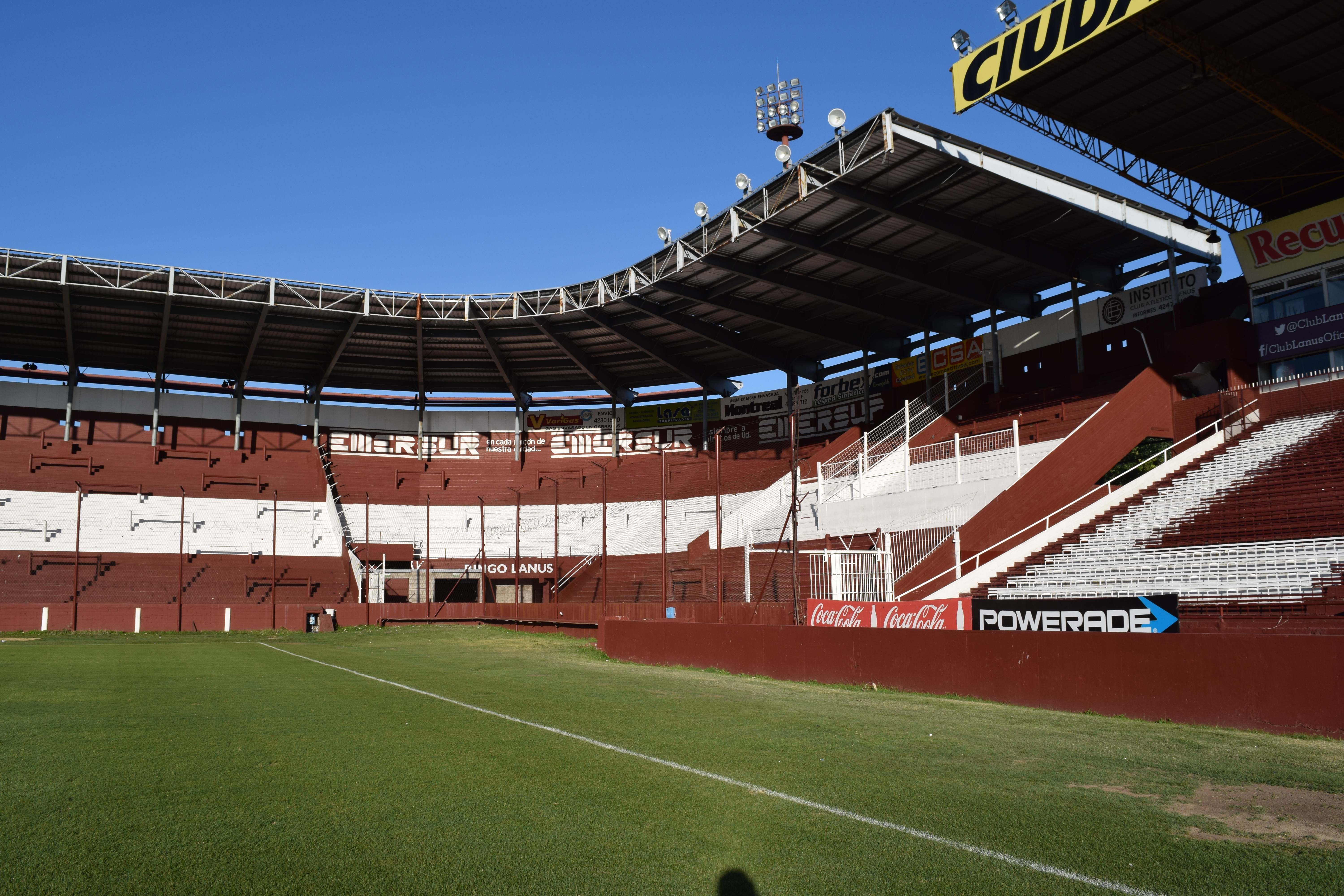 Vista parcial de la tribuna norte (sector, Juan Héctor Guidi, sobre la calle General Arias) y de la platea de socios (sobre la calle Fray Esquiú) del Estadio Ciudad de Lanús - Néstor Díaz Pérez.